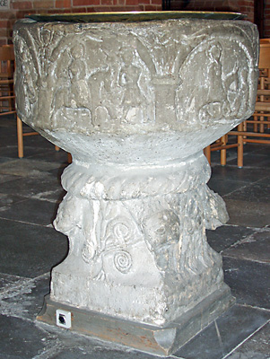 Døbefonten i St. Bendts Kirke , Ringsted, Denmark